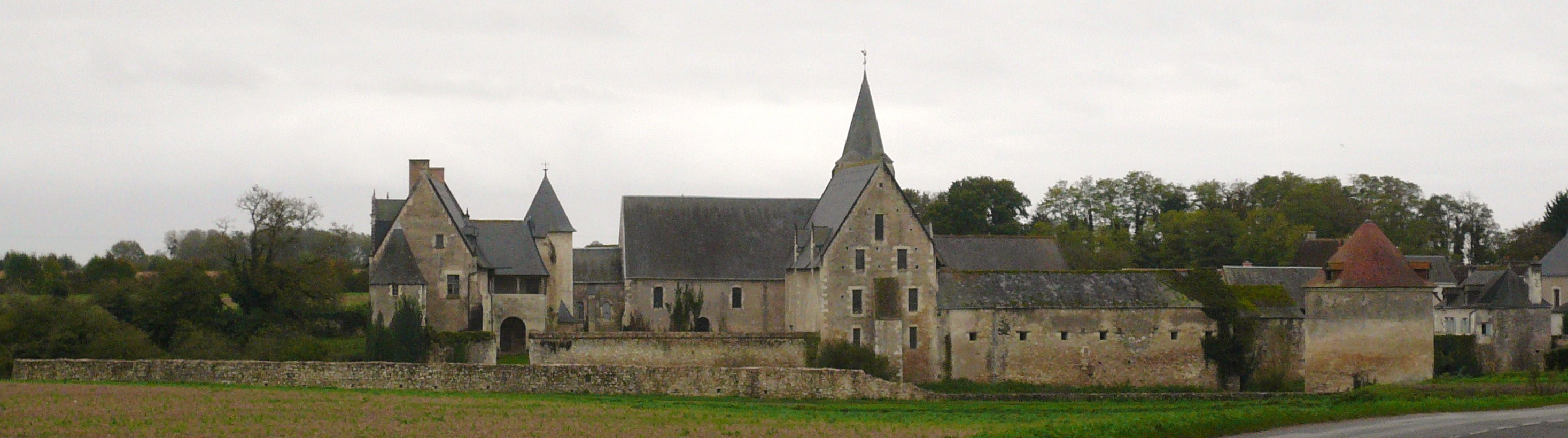 Vue d'ensemble de l'ancien prieuré du Louroux, Indre-et-Loire, Centre, France. Photo prise du nord. .